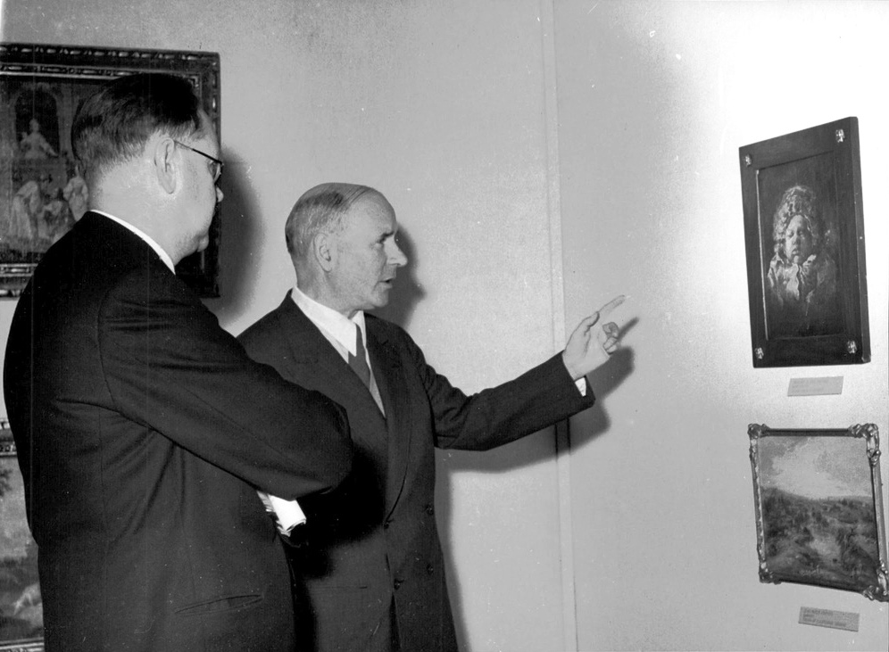 Direktör Aron Borelius och statsminister Tage Erlander.